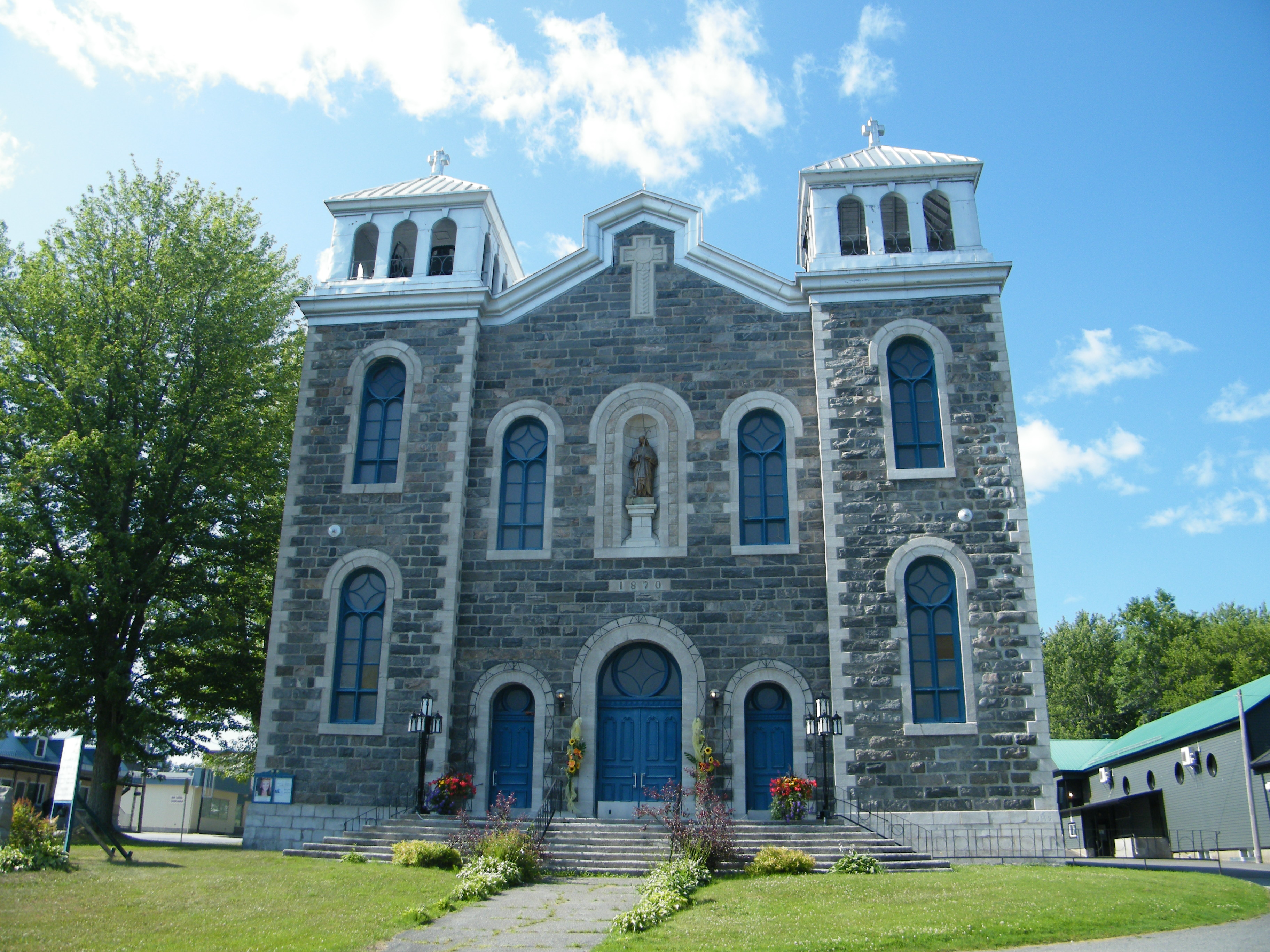 Église Sainte-Geneviève, située à Sainte-Geneviève-de-Batiscan dans la MRC des Chenaux, en Mauricie, au Québec. L'extérieur date de 1870. L'église avait été complètement détruite par un incendie, ne laissant que les quatre murs. L'église a été reconstruite à l'intérieur de ces murs en 1933, d'où les deux catégories plus bas : Église construite en 1870, et Église construite en 1933.